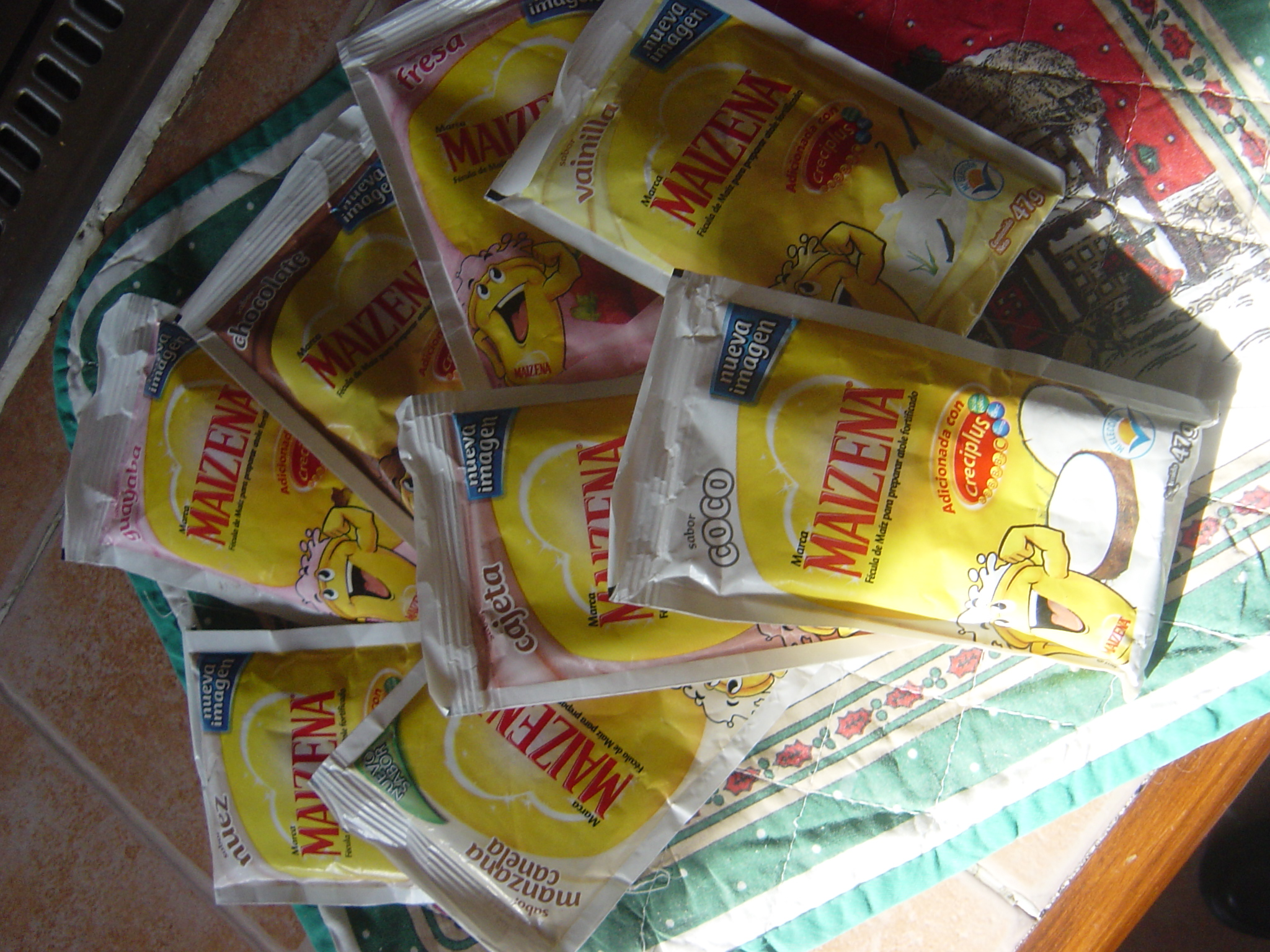 Sobres de harina de mais para preparar atoles